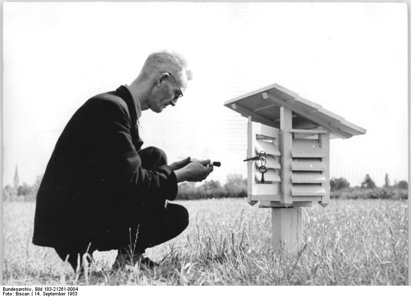 Gatersleben, Versuchsfeld mit Windschutzstreifen ZB-Biscan 14.9.1953 Windschutzstreifen im Examen. In den letzten Jahren wurden besonders im Bezirk Magdeburg nach sowjetsichen Vorbild hundertausende Bäume und Sträucher angepflanzt, die in einigen Jahren wirkungsvolle Windschutzstreifen bilden und zur Verbesserung des Klimas beitragen werden. Auf dem Gelände des Instituts für Kulturpflanzenforschung der Deutschen Akademie der Wissenschaften in Gatersleben wurden Windschutzstreifen in einer Gesamtlänge von fast 600 Metern angepflanzt, um wissenschaftlichen Beobachtungen darüber anstellen zu können, wie sich der Windschutz auf die Erträge der Kulturpflanzen auswirkt. UBz: Wetterdiensstechniker Kurt Mäther vom Institut für Kulturpflanzenforschung liesst mehrmals am Tage die Messinstrumente ab, um lückenlose Unterlagen für die Beurteilung der Windschutzwirkung zu sammeln.